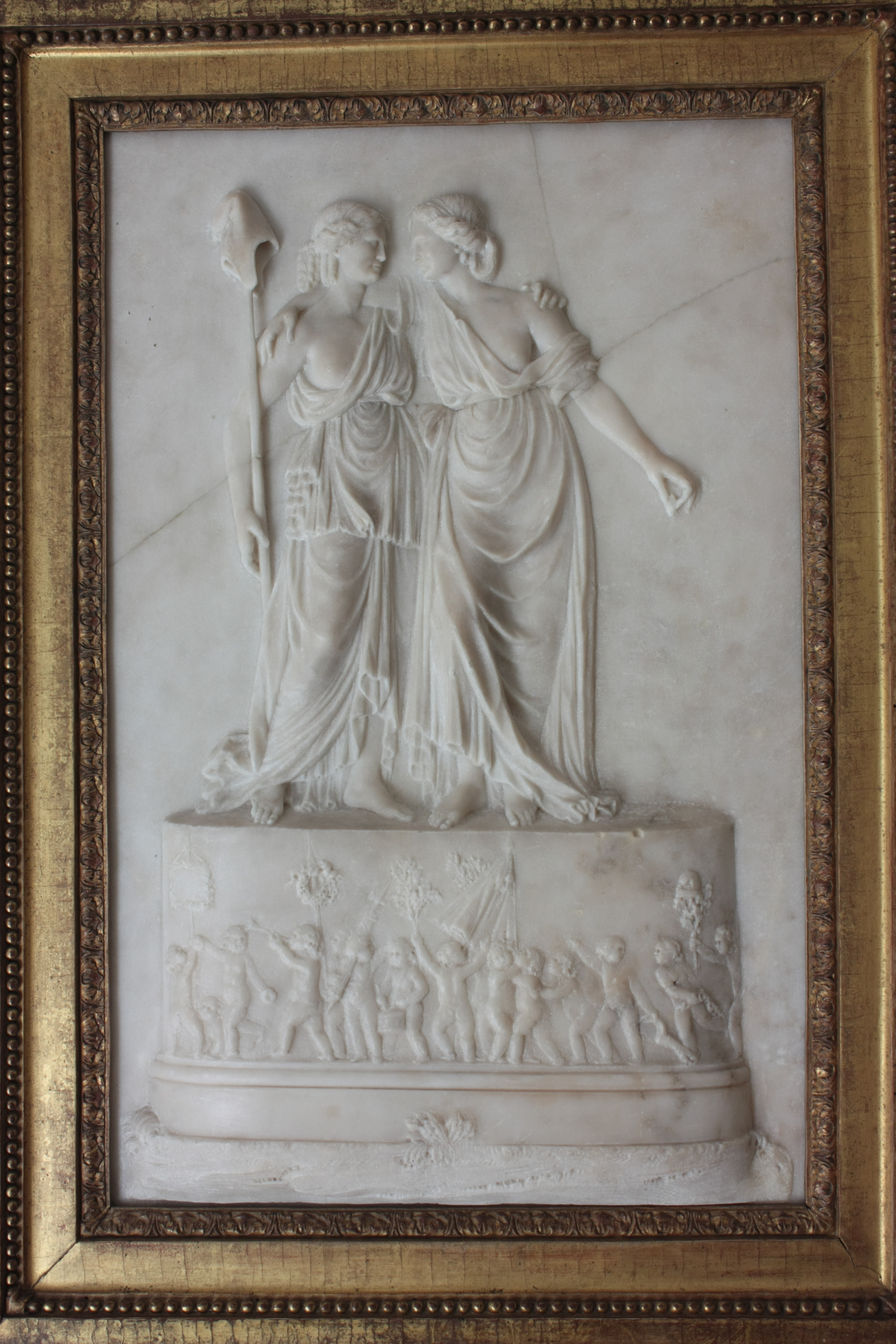 Allégorie de la Liberté, de l’Égalité et de la Fraternité, marbre de 1793.